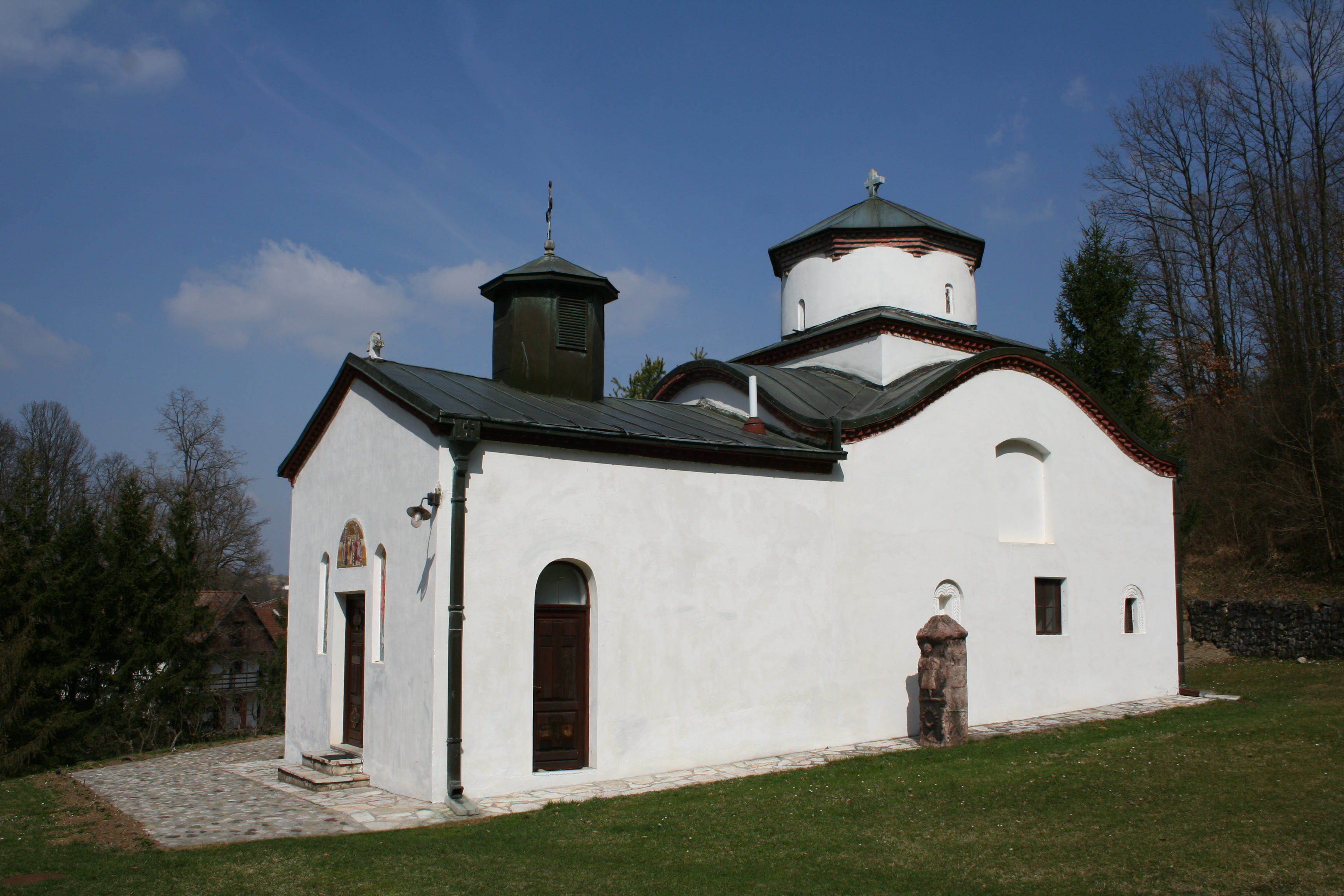 Manastir Dokmir